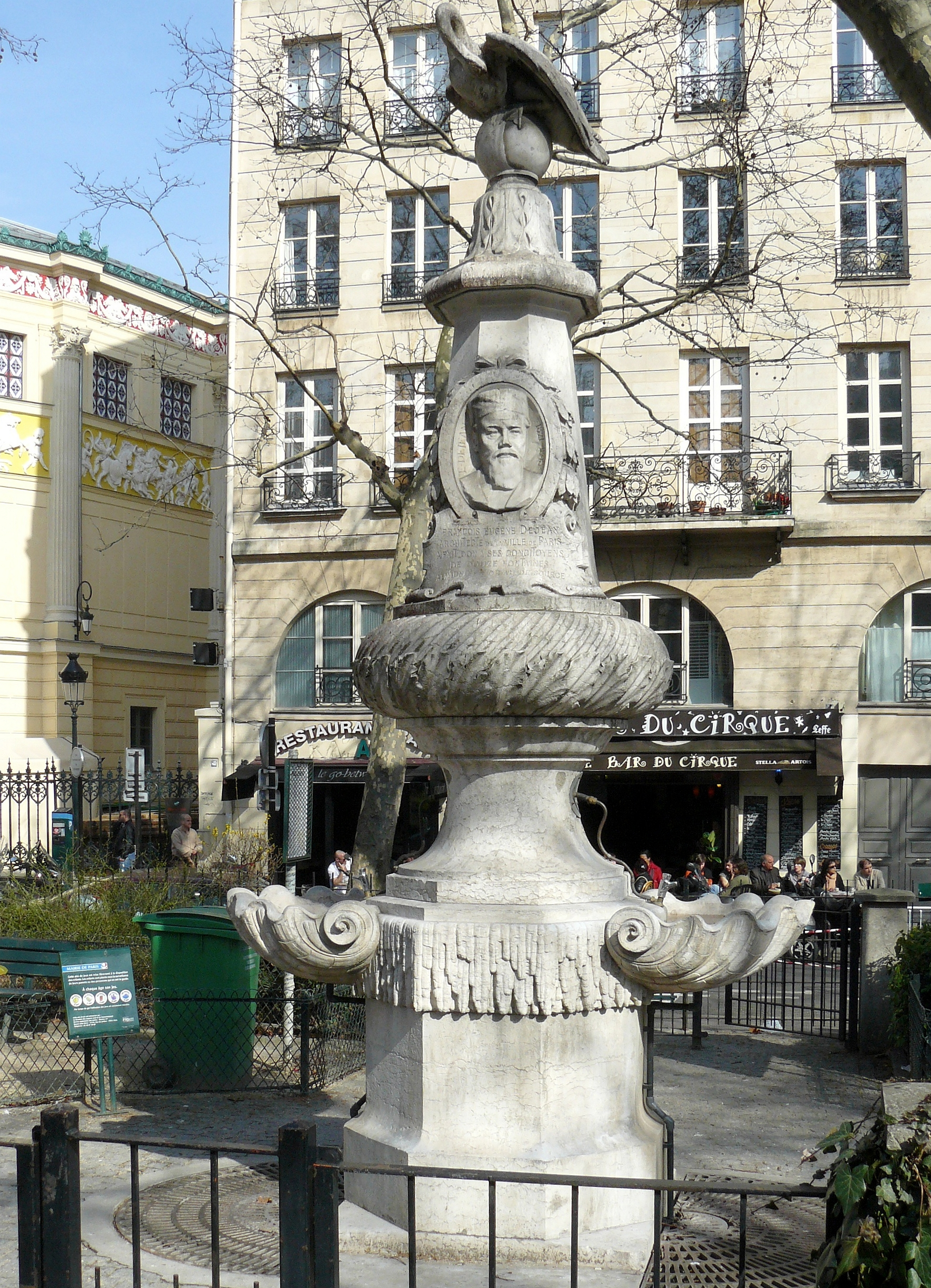 La fontaine Dejean, dans le square de la place Pasdeloup, XIe arrondissement de Paris, juste à coté du Cirque d'hiver. Construite en 1906.